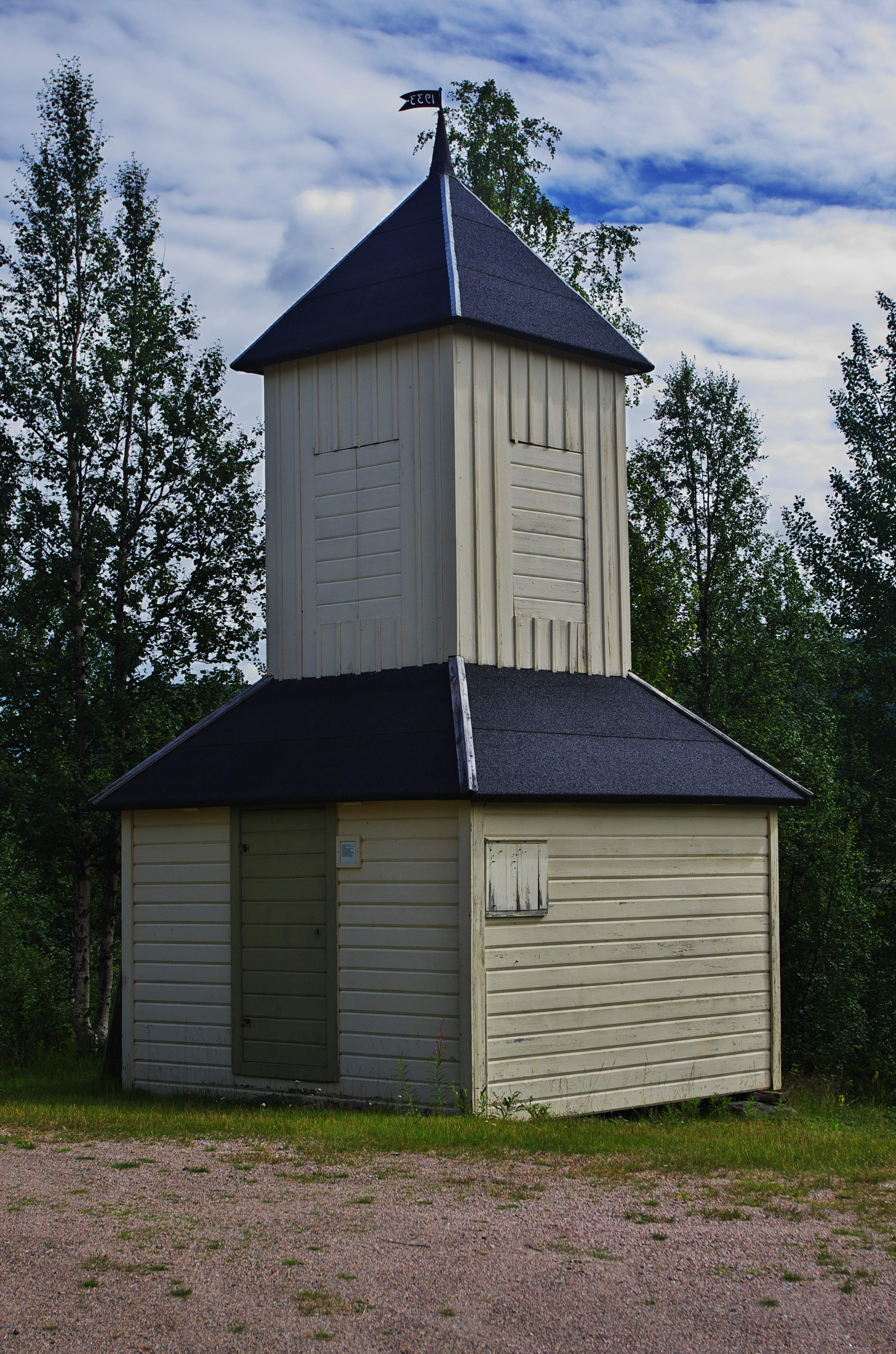 Jäkkviks kapell i Jäkkvik i Arjeplogs kommun i Lappland i Sverige. Kapellet uppfördes år 1777 på Lövmokk, en landtunga söder om kapellforsen. Kapellet flyttades till sin nuvarande plats i Jäkkvik år 1885.